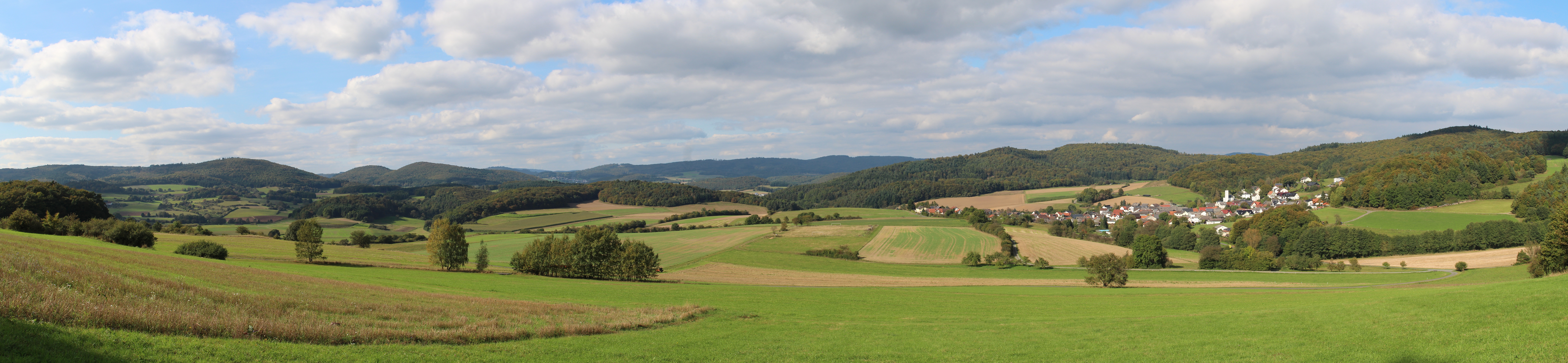 Herzhausen